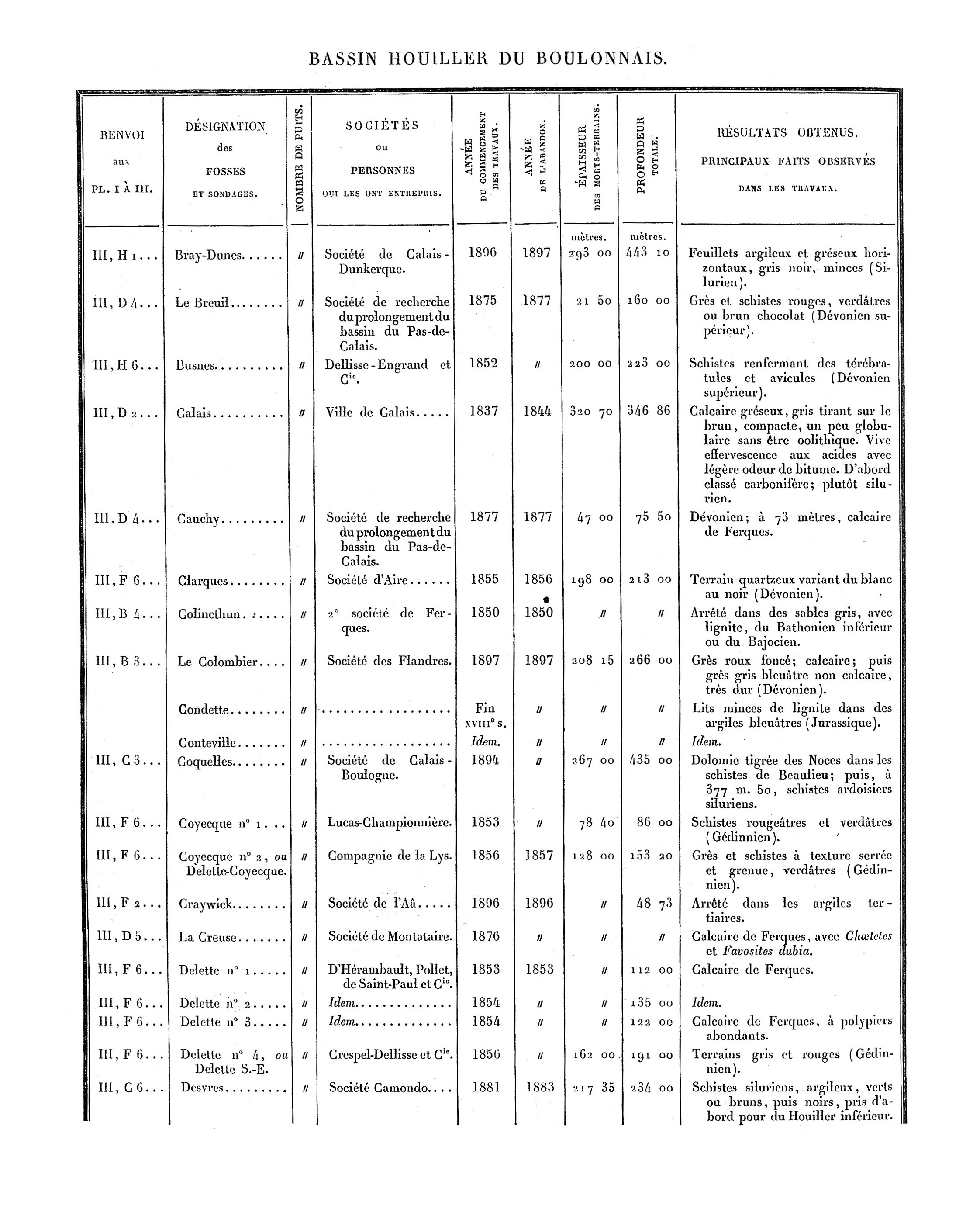 Liste des puits de mine et des sondages. Mines du Boulonnais. Document extrait de Étude des Gîtes Minéraux de la France. Topographie Souterraine du Bassin Houiller du Boulonnais ou Bassin d'Hardinghen, par A. Olry, ingénieur en chef des Mines. Chapitre IX, pages 172 à 189.